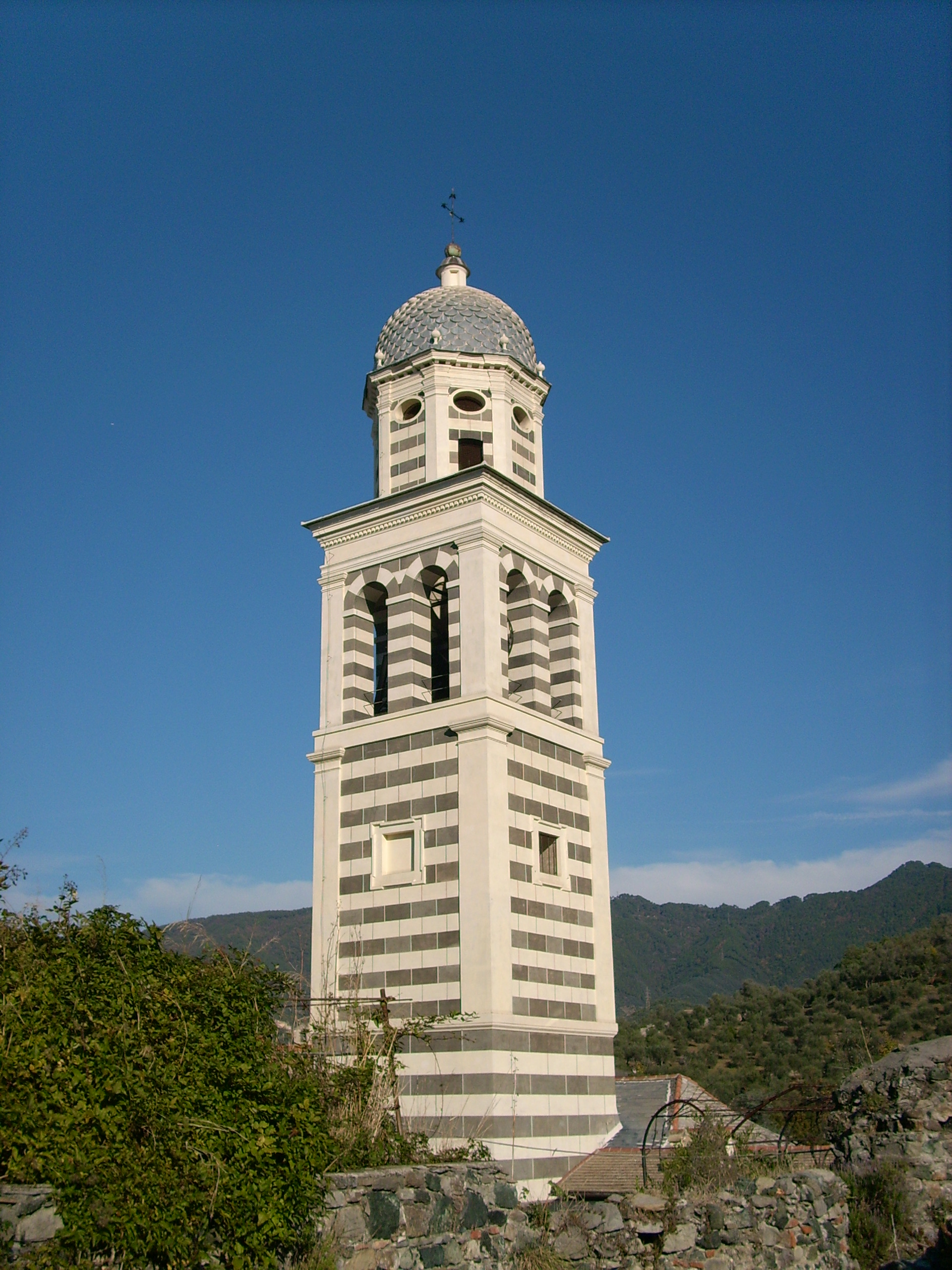 Chiesa di Sant'Andrea Apostolo di Levanto, Liguria, Italia